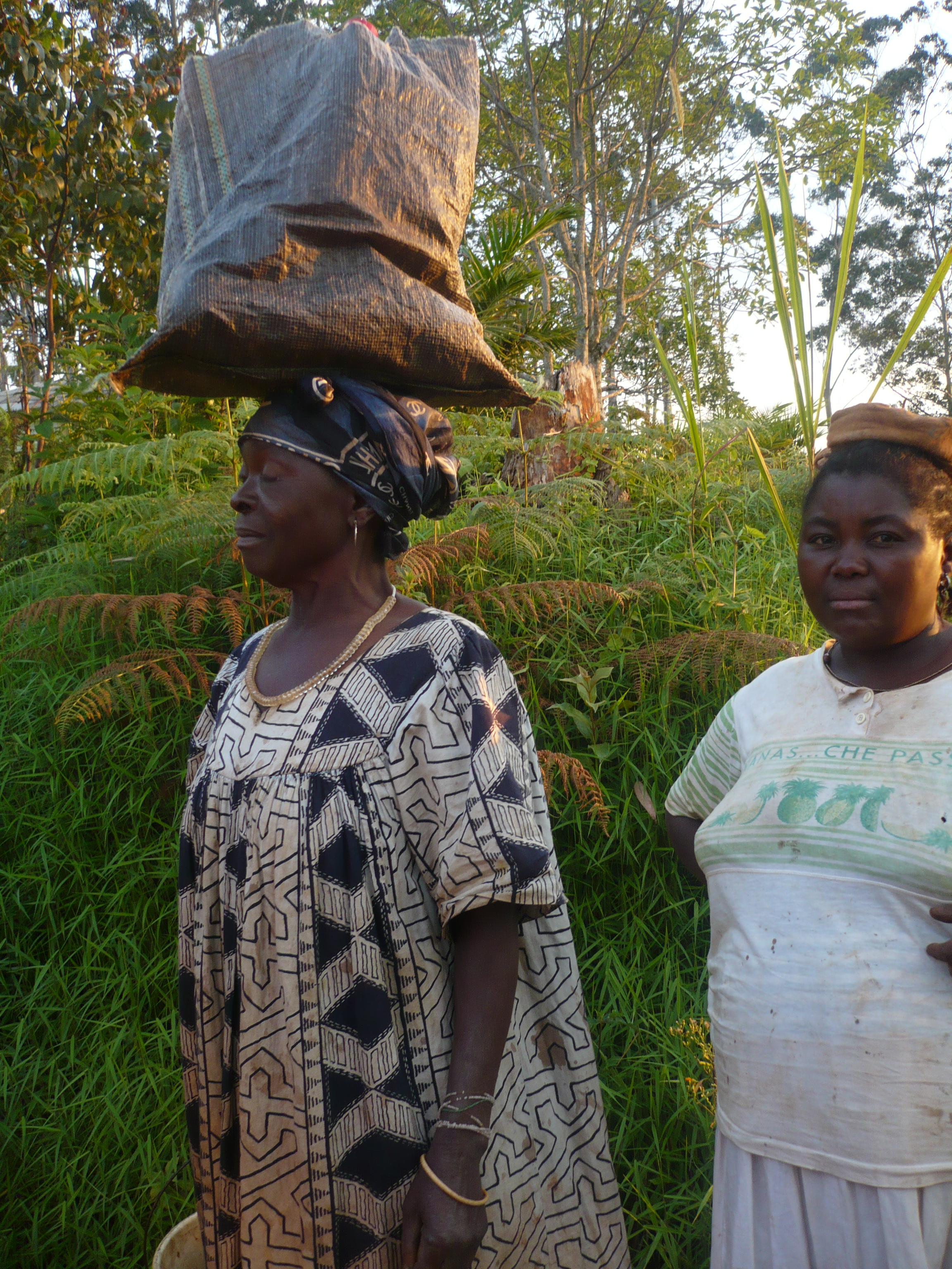 Paysanne Bamiléké au retour du champ près de Bana avec sa corbeille sur la tête This is an image with the theme "Africa on the Move or Transport" from: Cameroon